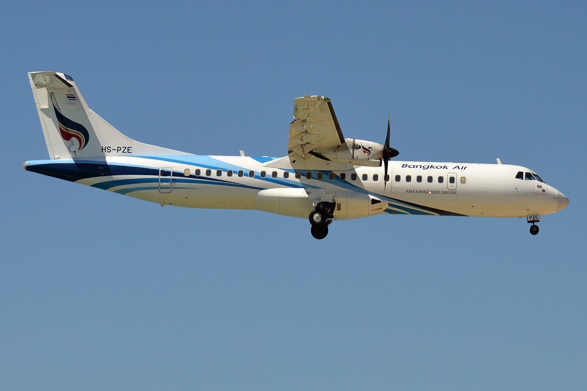 Bangkok Airways, HS-PZE, ATR 72-600